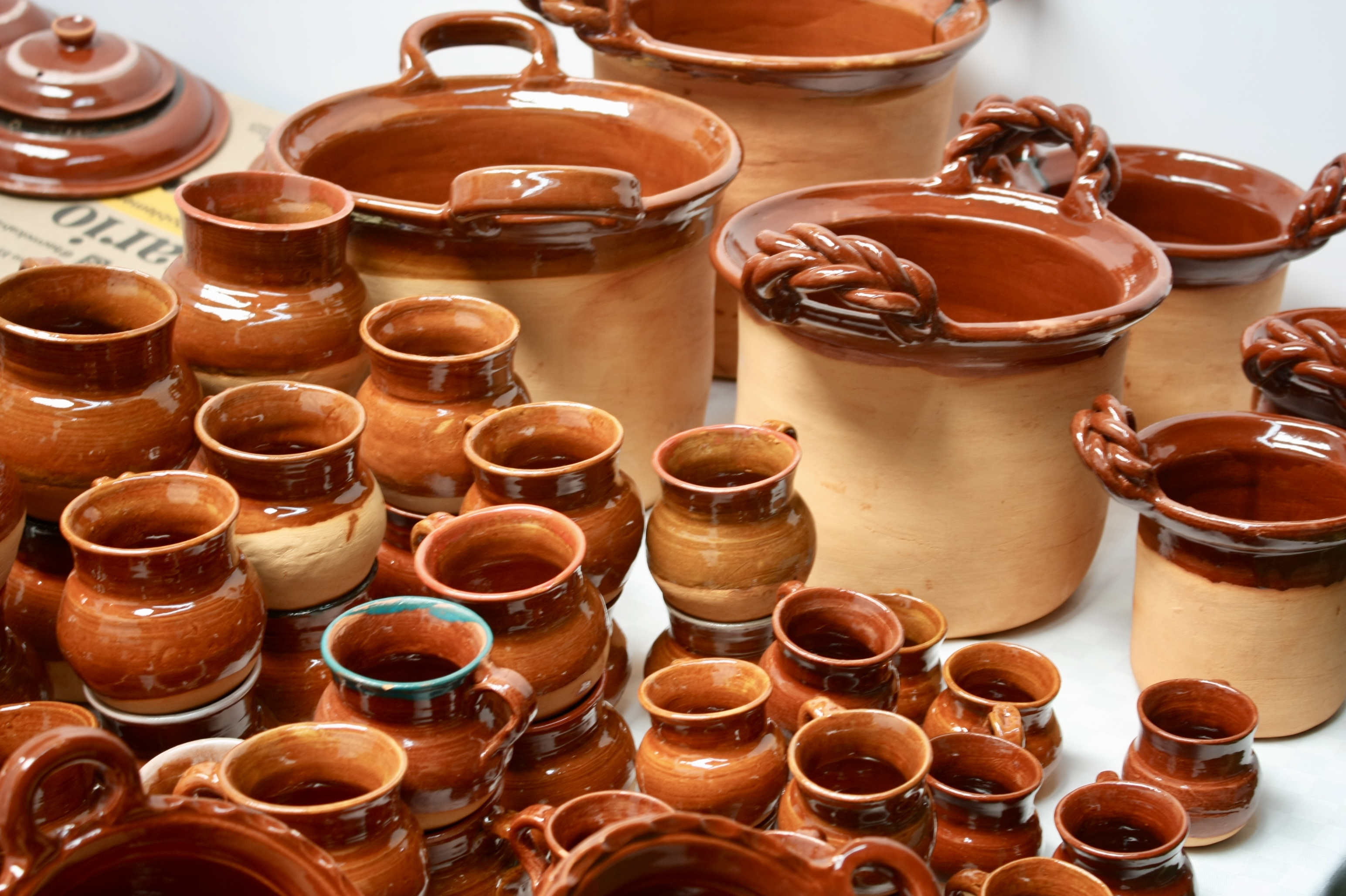 Jarros y ollas de barro